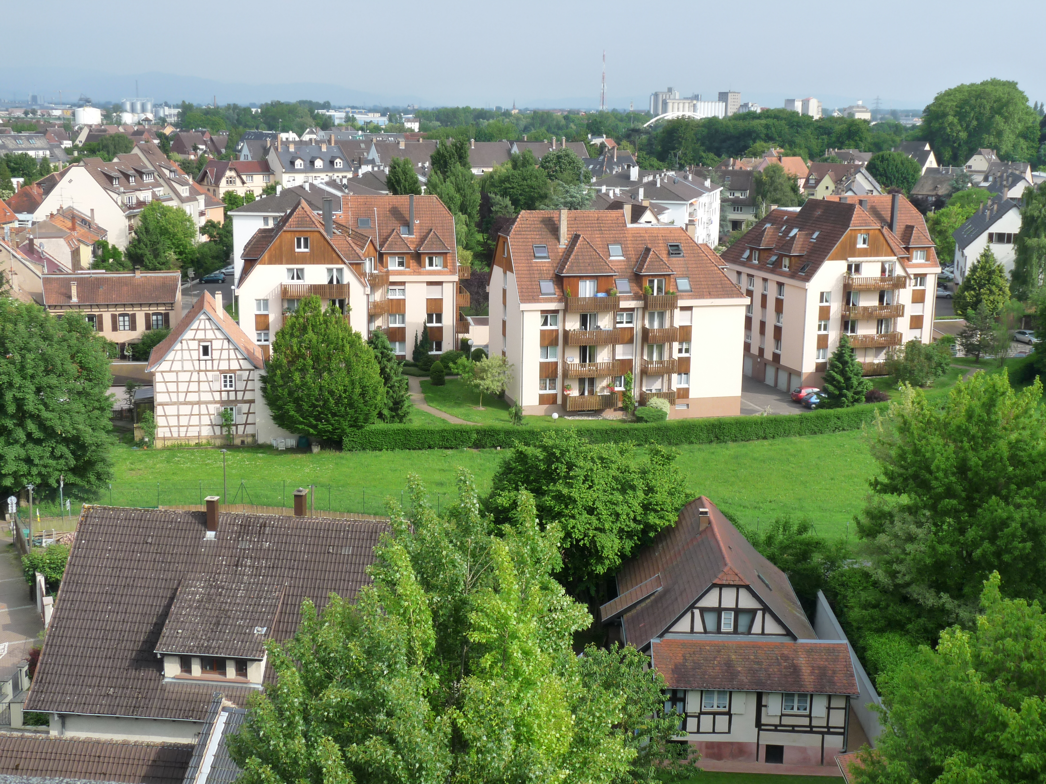 Quartier de la Robertsau (Strasbourg) : petites résidences et maisons à colombages dans la rue des Jardiniers. A l'arrière-plan, les contreforts de la Forêt-Noire (Allemagne) et l'émetteur du port du Rhin